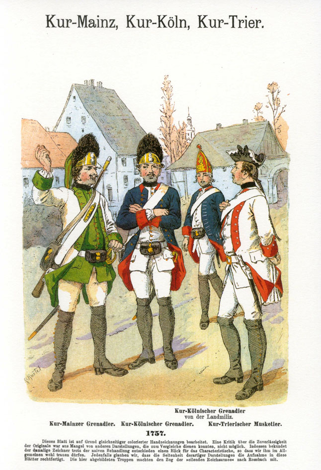 Иллюстрация Рихарда Кнотеля